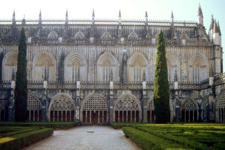 Claustro Real Batalha